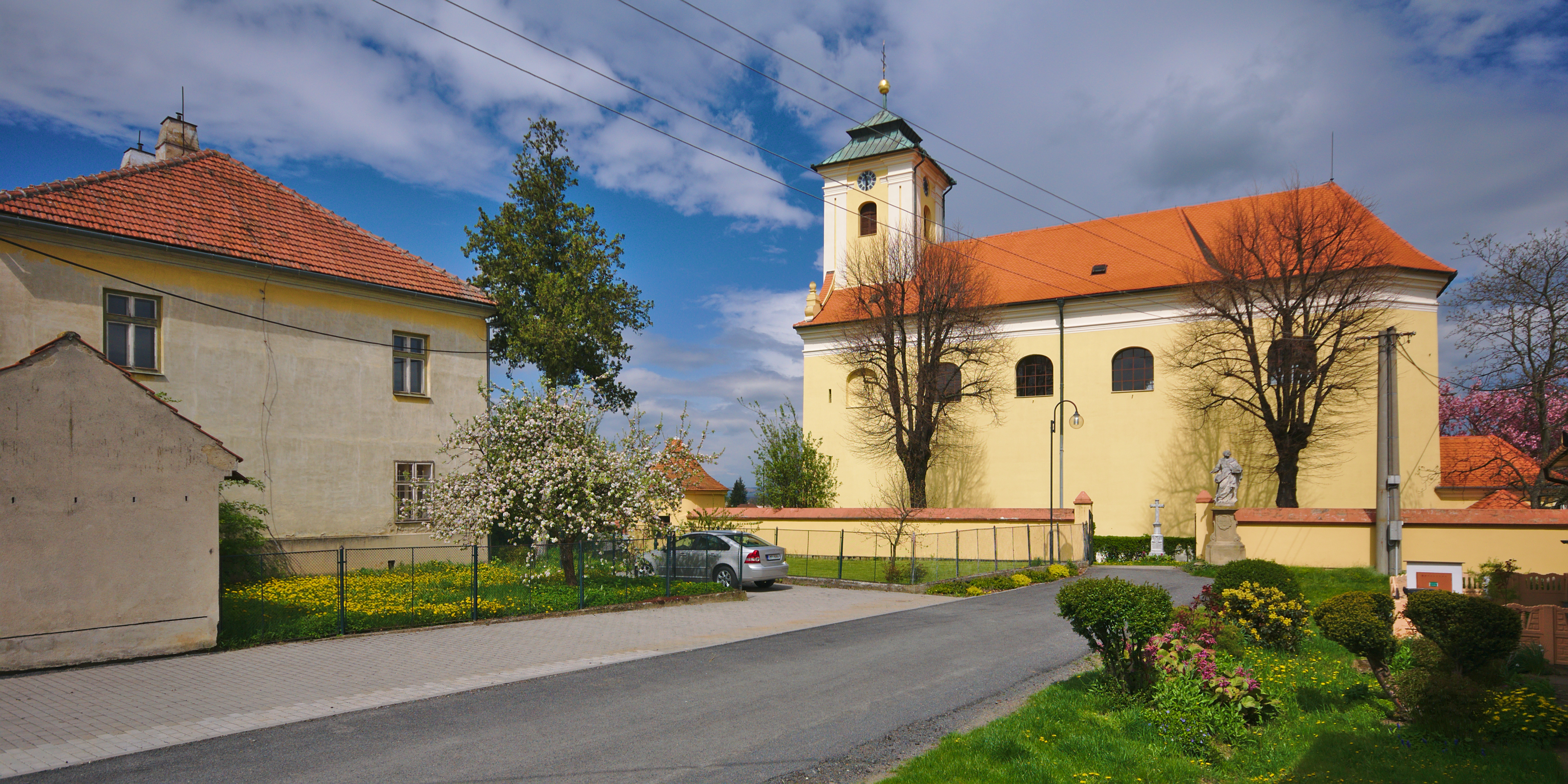 Kostel svatého Ondřeje, Pavlovice u Kojetína, okres Prostějov